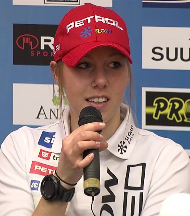 Anja Eržen